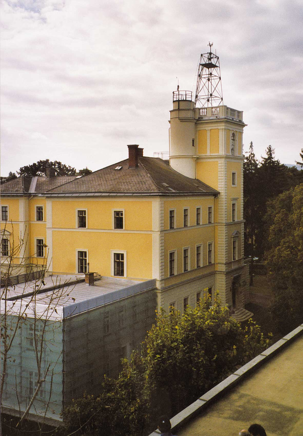 Hann Haus der ZAMG in Wien-Döbling, Autorin: Christa Hammerl, ZAMG